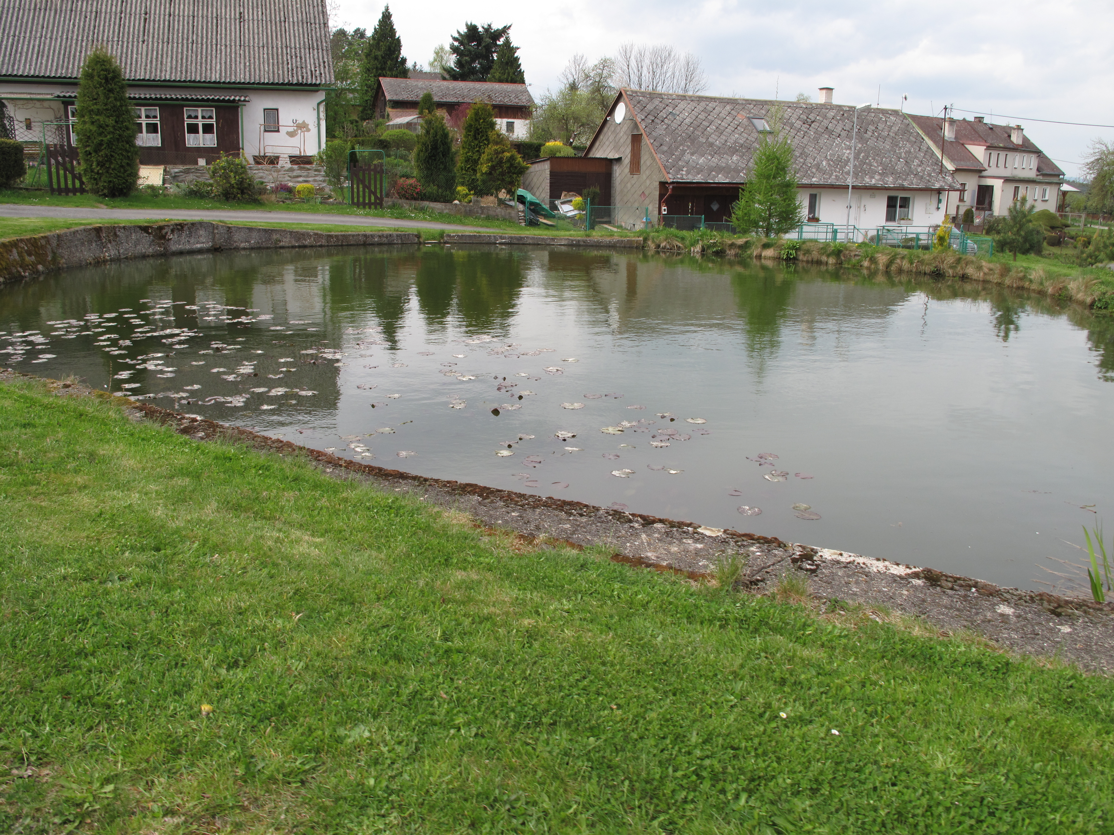 Javor (okres Klatovy). Okres Klatovy, Česká republika.